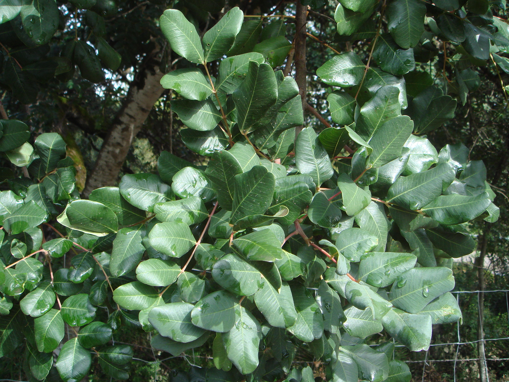 Ceratonia siliqua, El Bosque, Cádiz, España